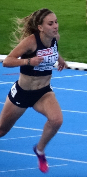 Młodzieżowe Mistrzostwa Europy w Lekkoatletyce U23 w Bydgoszczy 13-16 lipca 2017, półfinał biegu na 100 m przez płotki kobiet